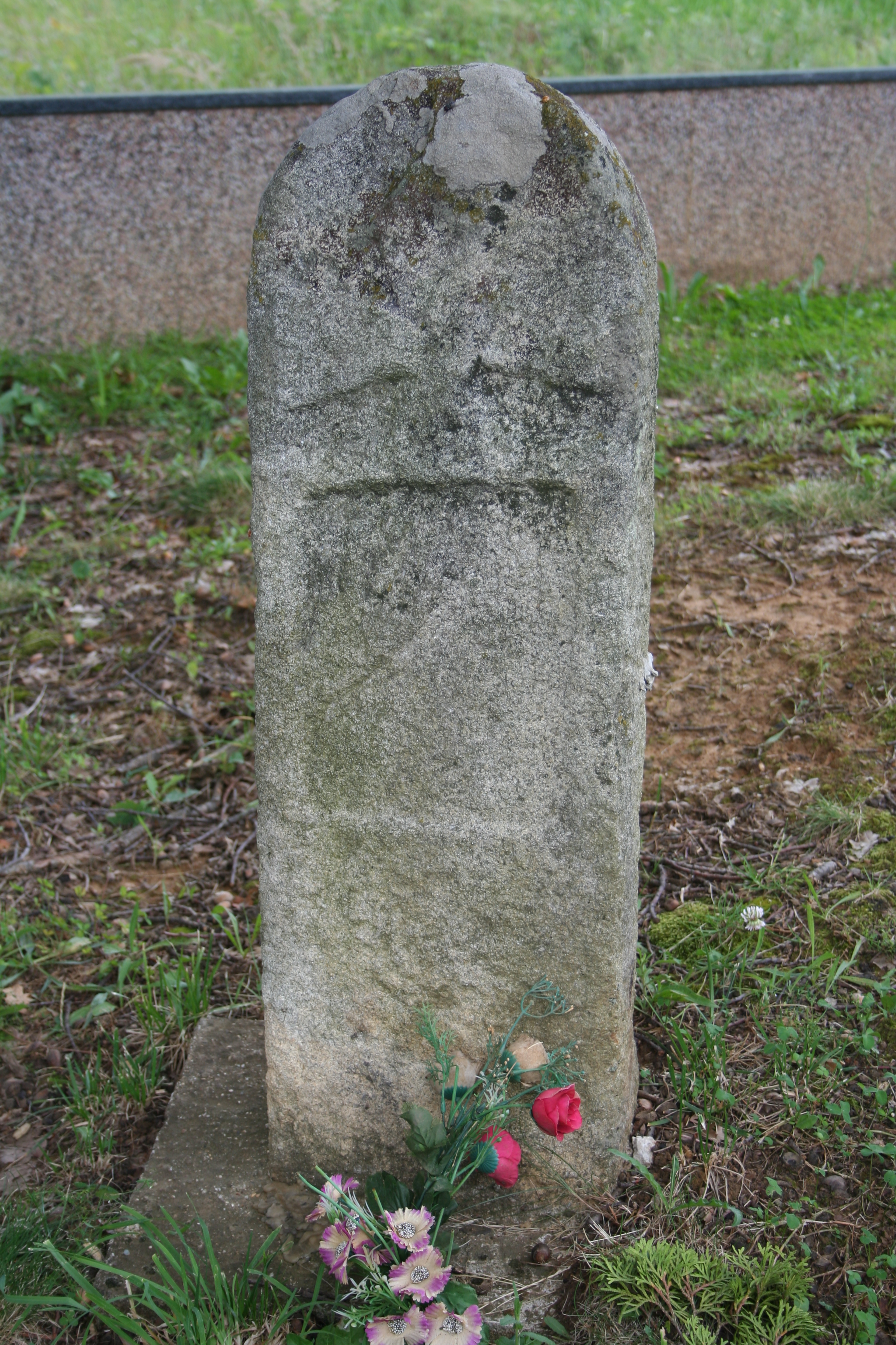 Ašikov grob (Spomenik ljubavi), opština Koceljeva